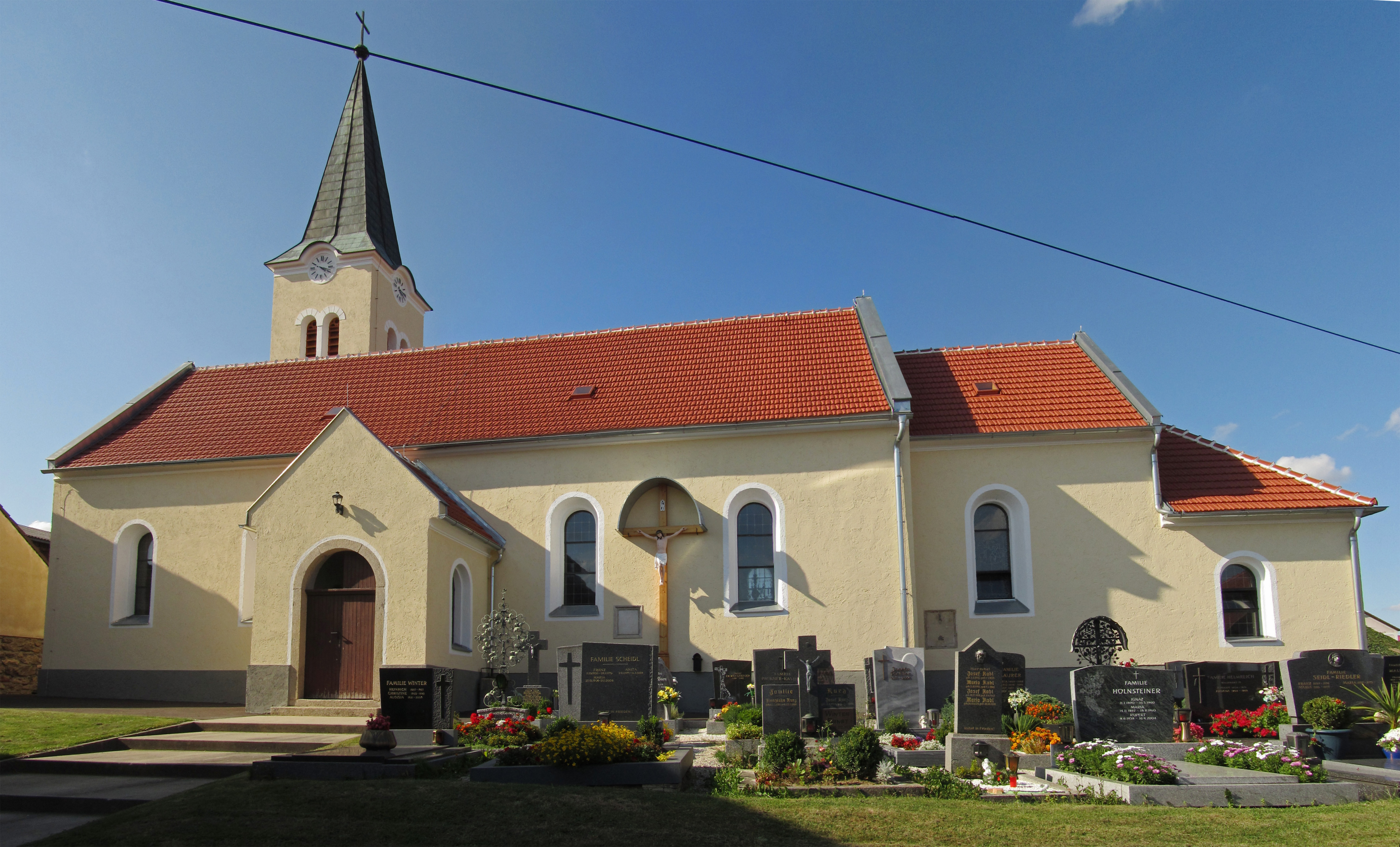 Die 1784 wahrscheinlich auf älteren Fundamenten erbaute Saalkirche wurde 1873 verlängert und erhielt 1874 ihren Turm.